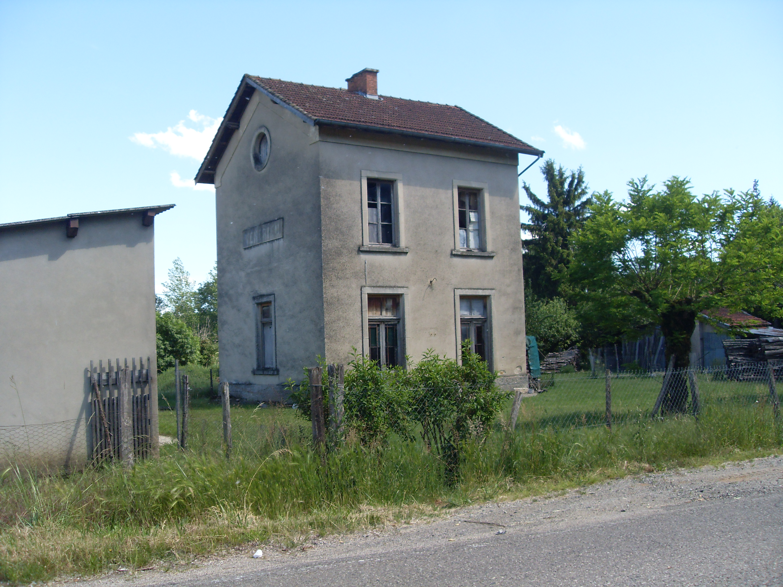 Ancienne gare du Chemin de fer de l'Est de Lyon à Vénérieu